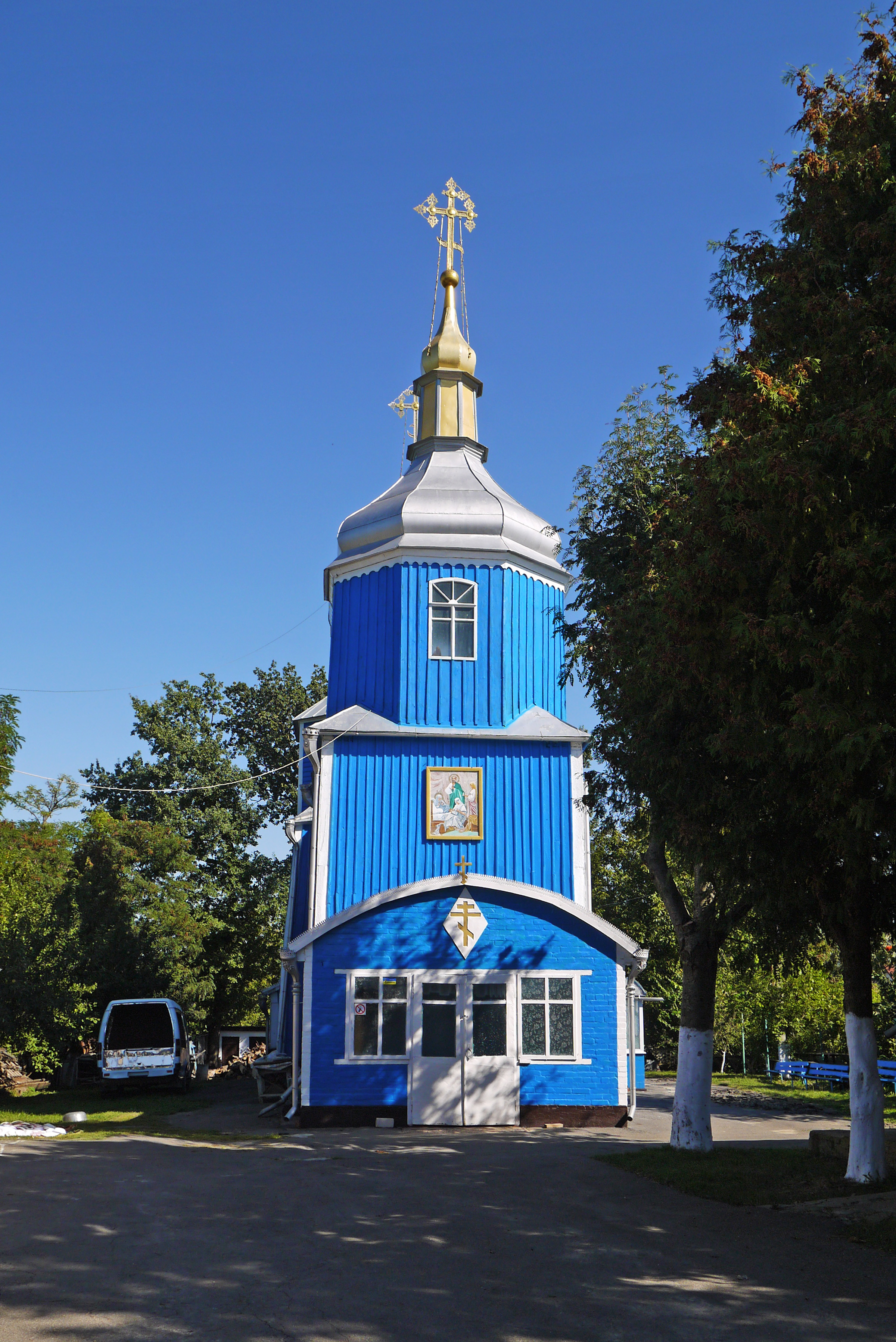 Церква Різдва Богородиці (дер.), Слобода-Шаргородська, вул. Космонавтів,1